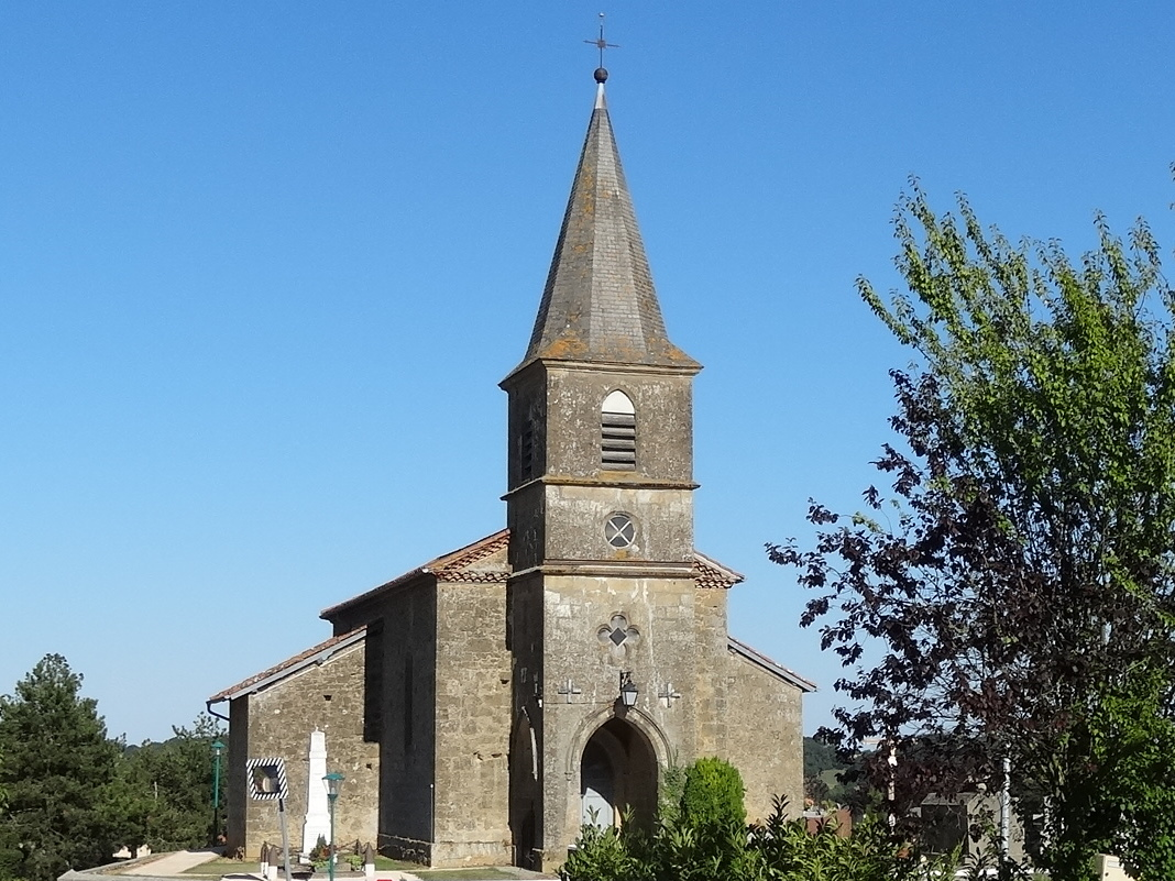 L'église de Manent-Montané